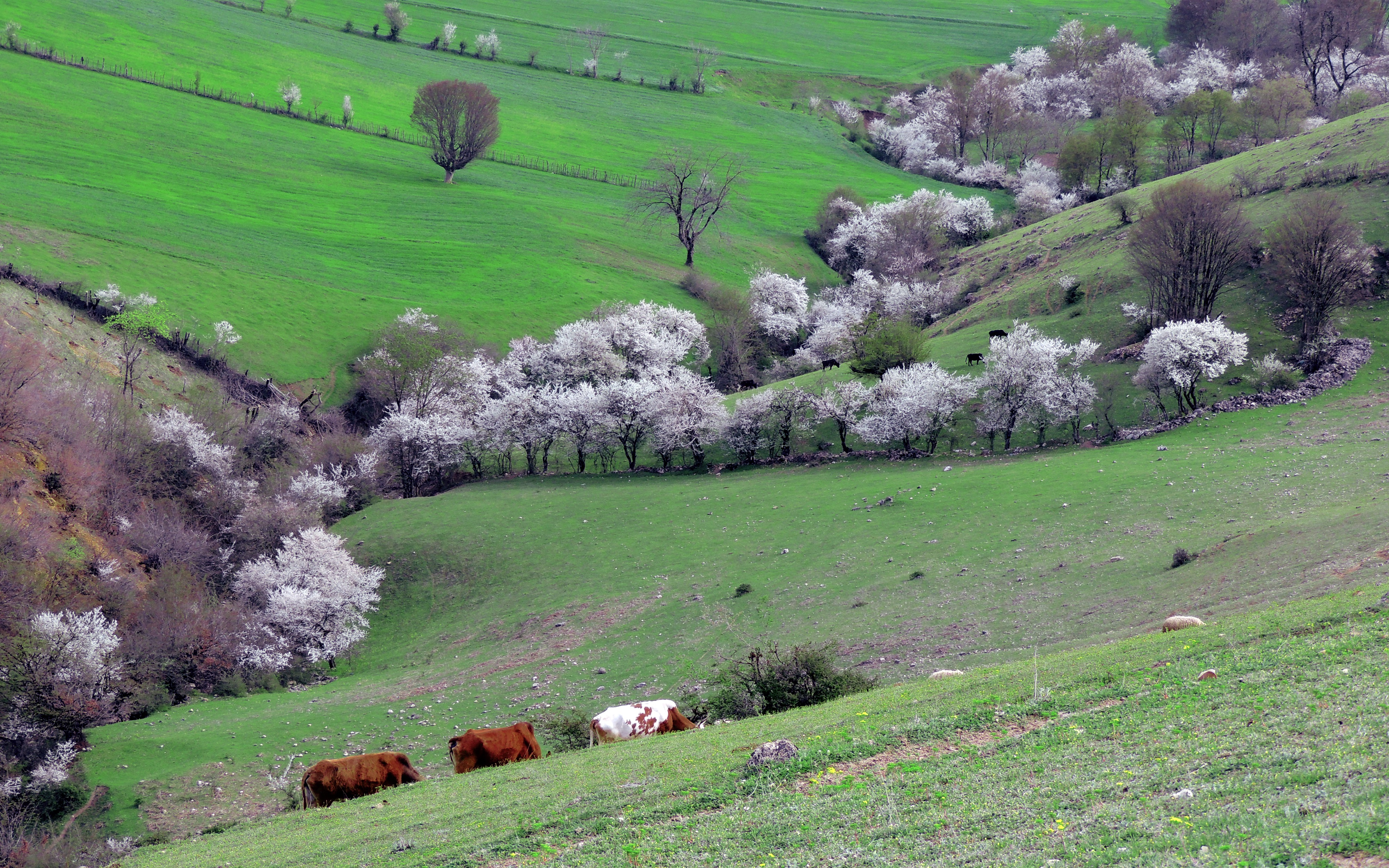 عکس توسط الف میم پاشا در بهار 1391 گرفته شده است